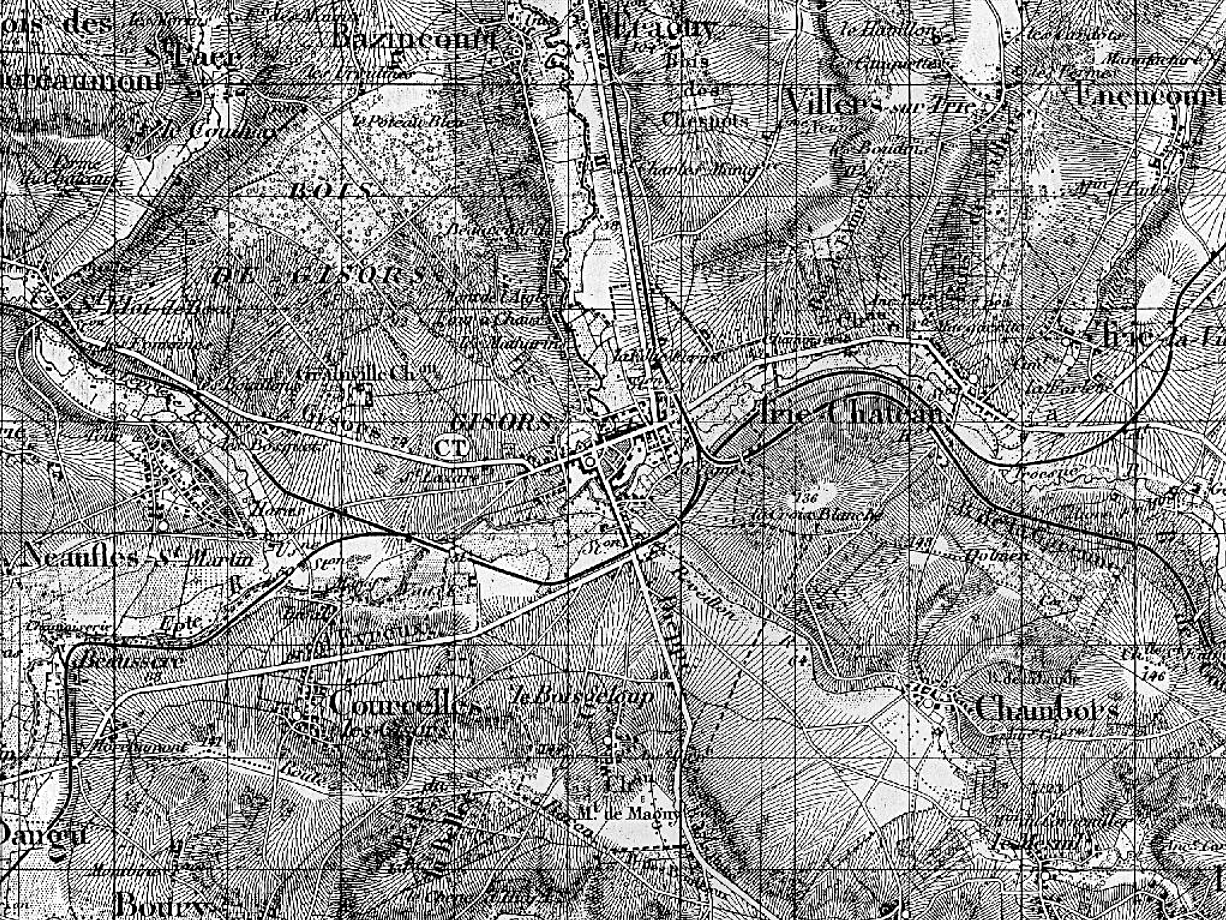 Le nœud ferroviaire de Gisors (Eure). Carte d’État-Major au 1/50.000 type 1889, feuilles au 1/50000 - 1889, 1907.